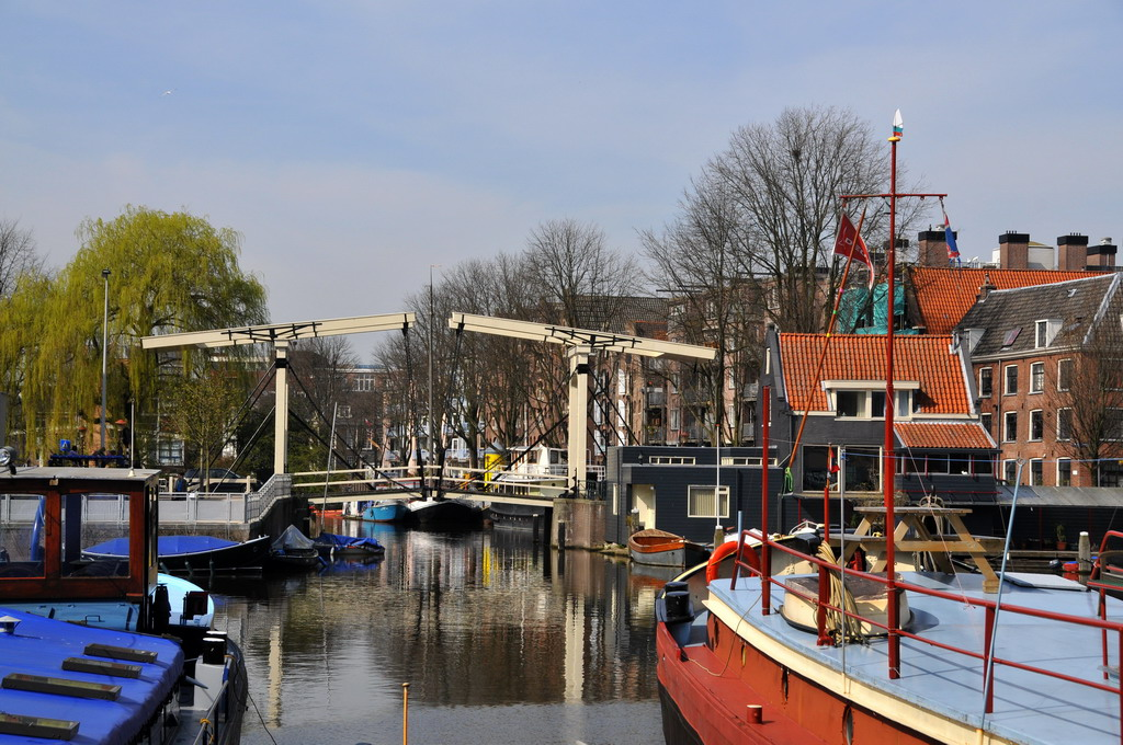 'Zandhoek bridge' (gezien vanaf Westerdok)